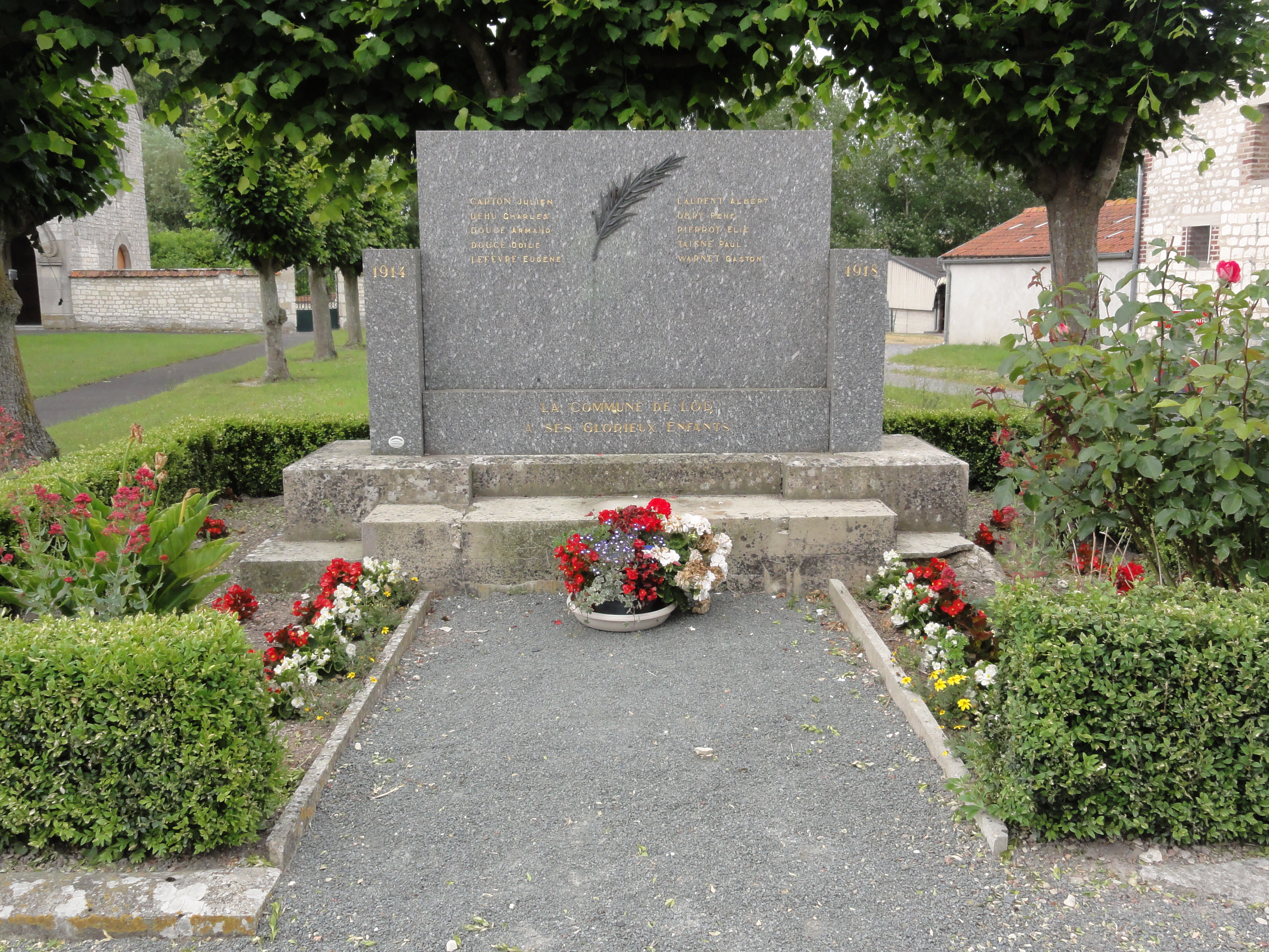 Lor (Aisne) monument aux morts